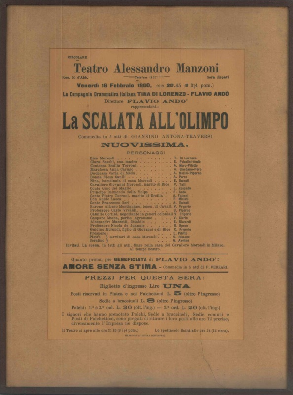 Locandina della prima della commedia "La scalata all'Olimpo" di Giannino Antona Traversi